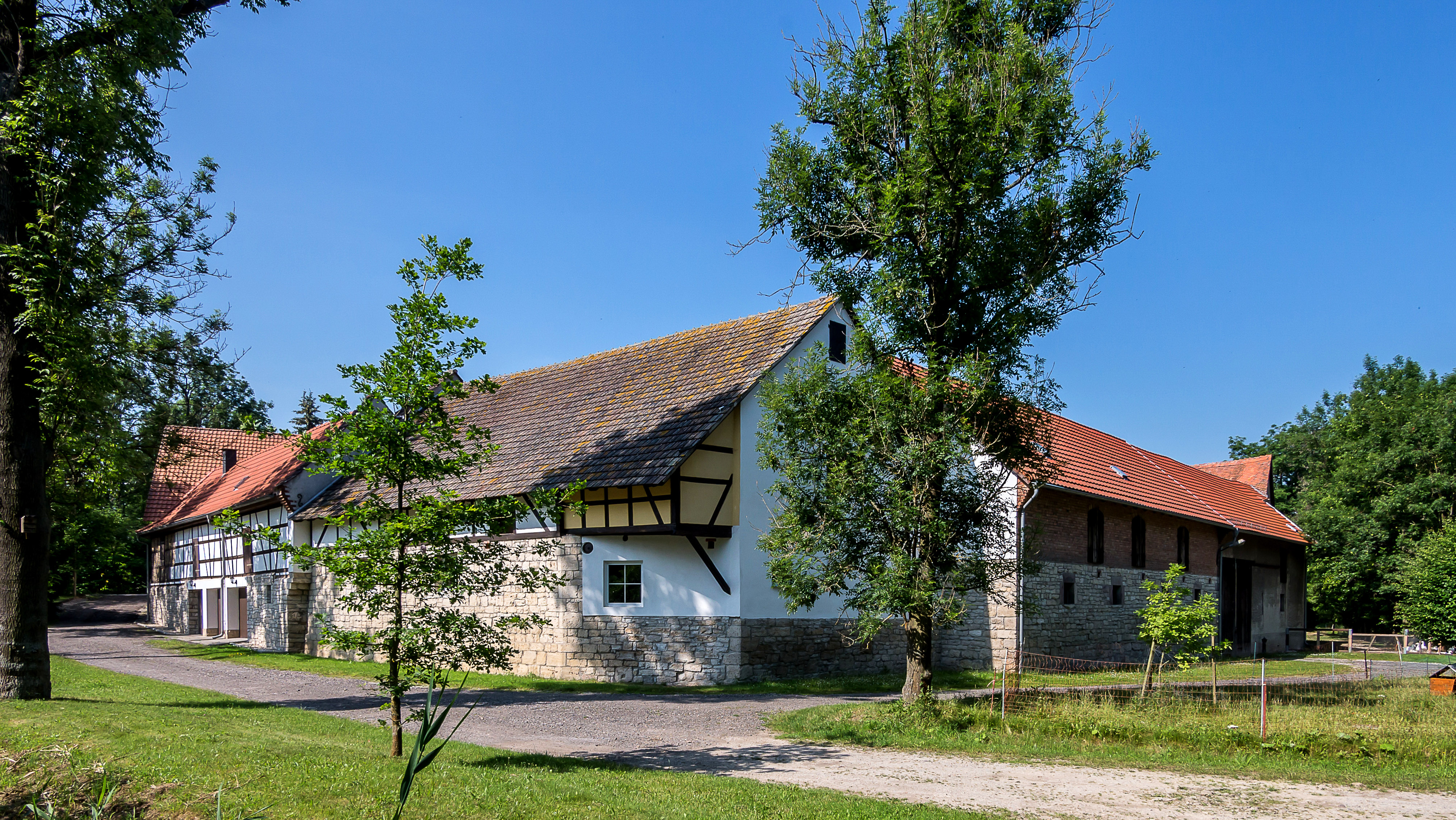 Magdala Richard-Wagner-Straße 14 ehemalige Wiesenmühle